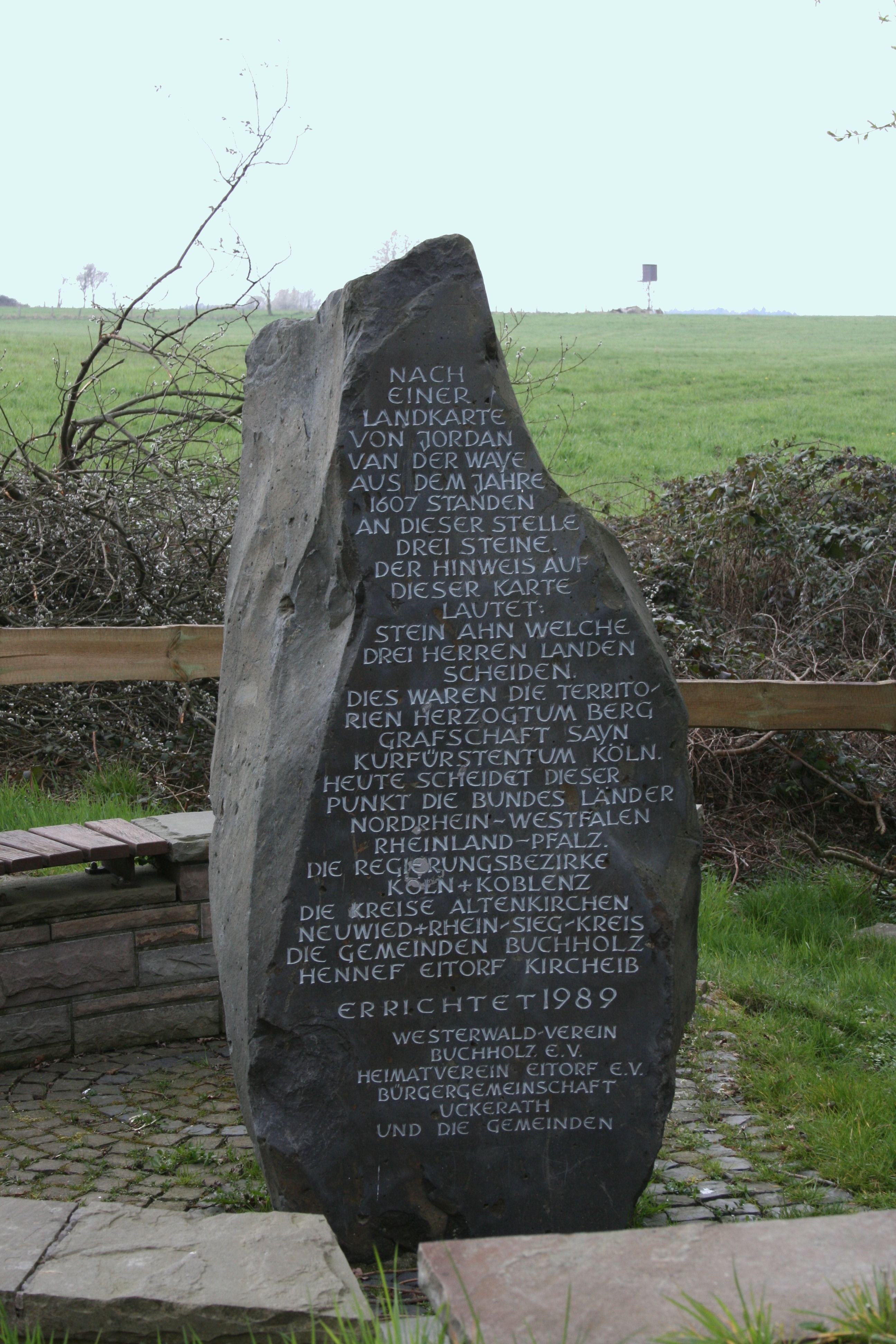 Denkmal Dreiherrenstein (1989) in Meisenbach, Hennef (Sieg)